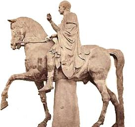 Statua equestre di Marco Nonio Balbo adulto (la testa è di restauro), omaggio dei Nocerini. Statua equestre di Marco Nonio Balbo.